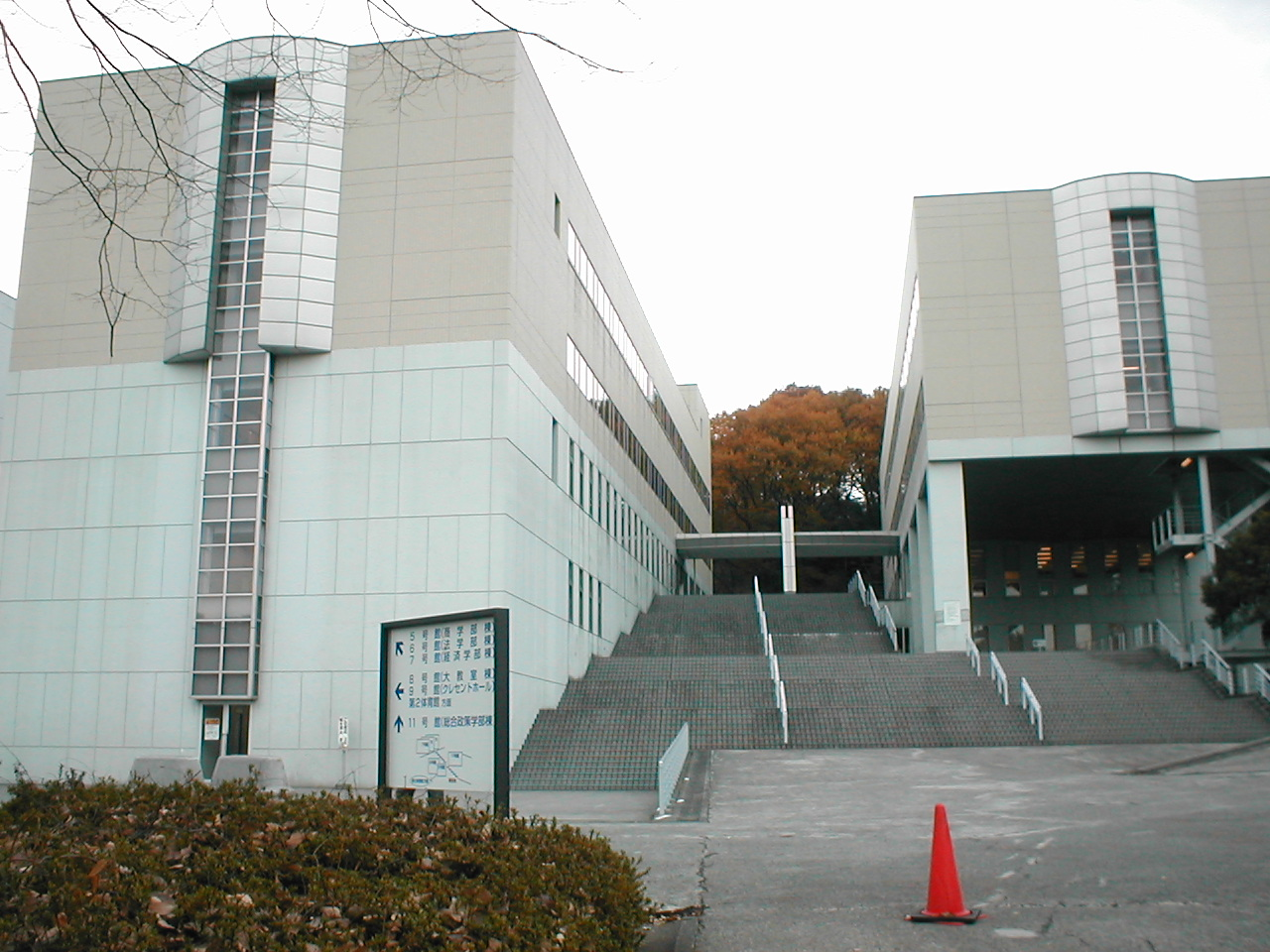 中央大学八王子キャンパス総合政策学部棟